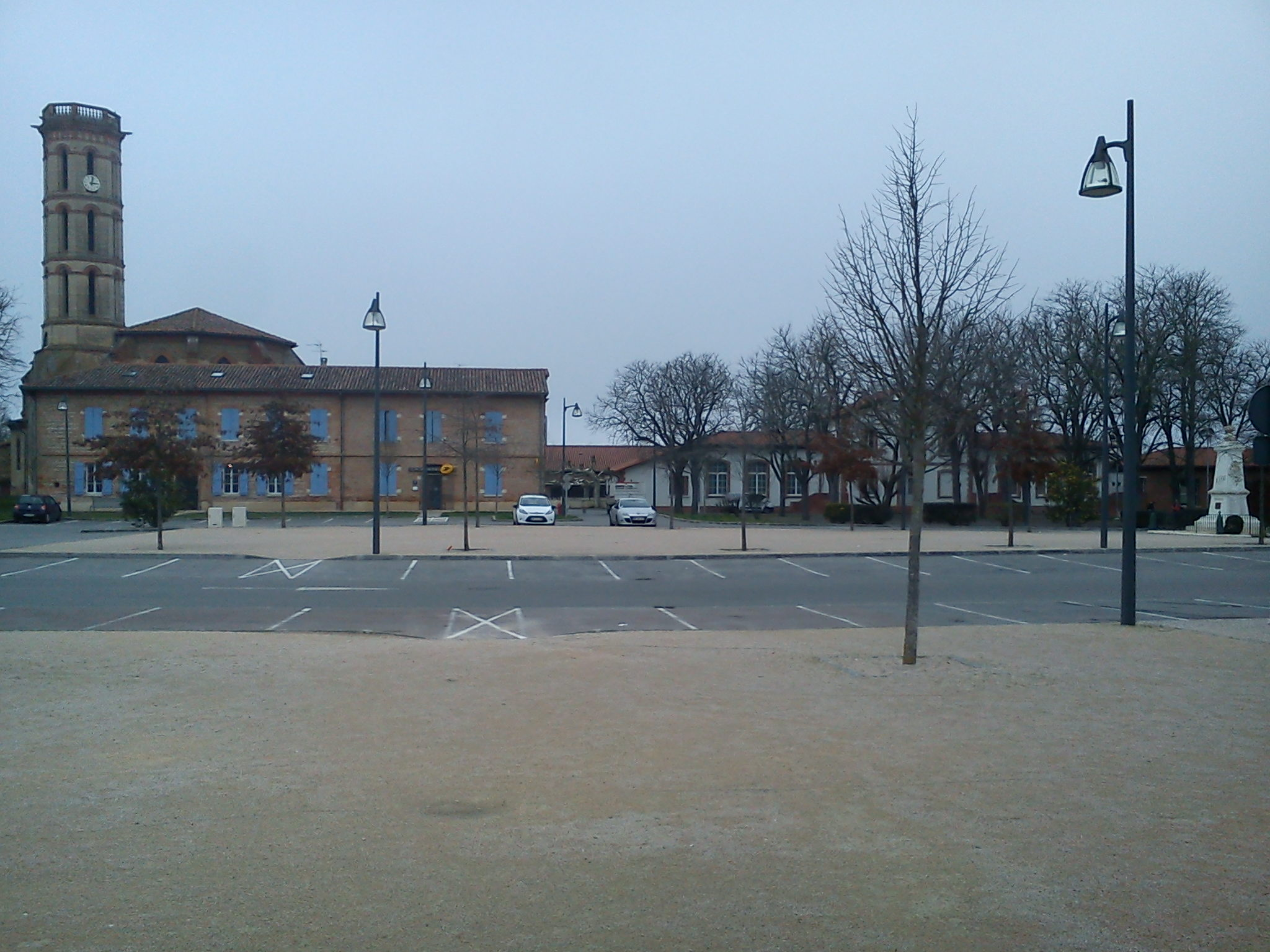 Bérat